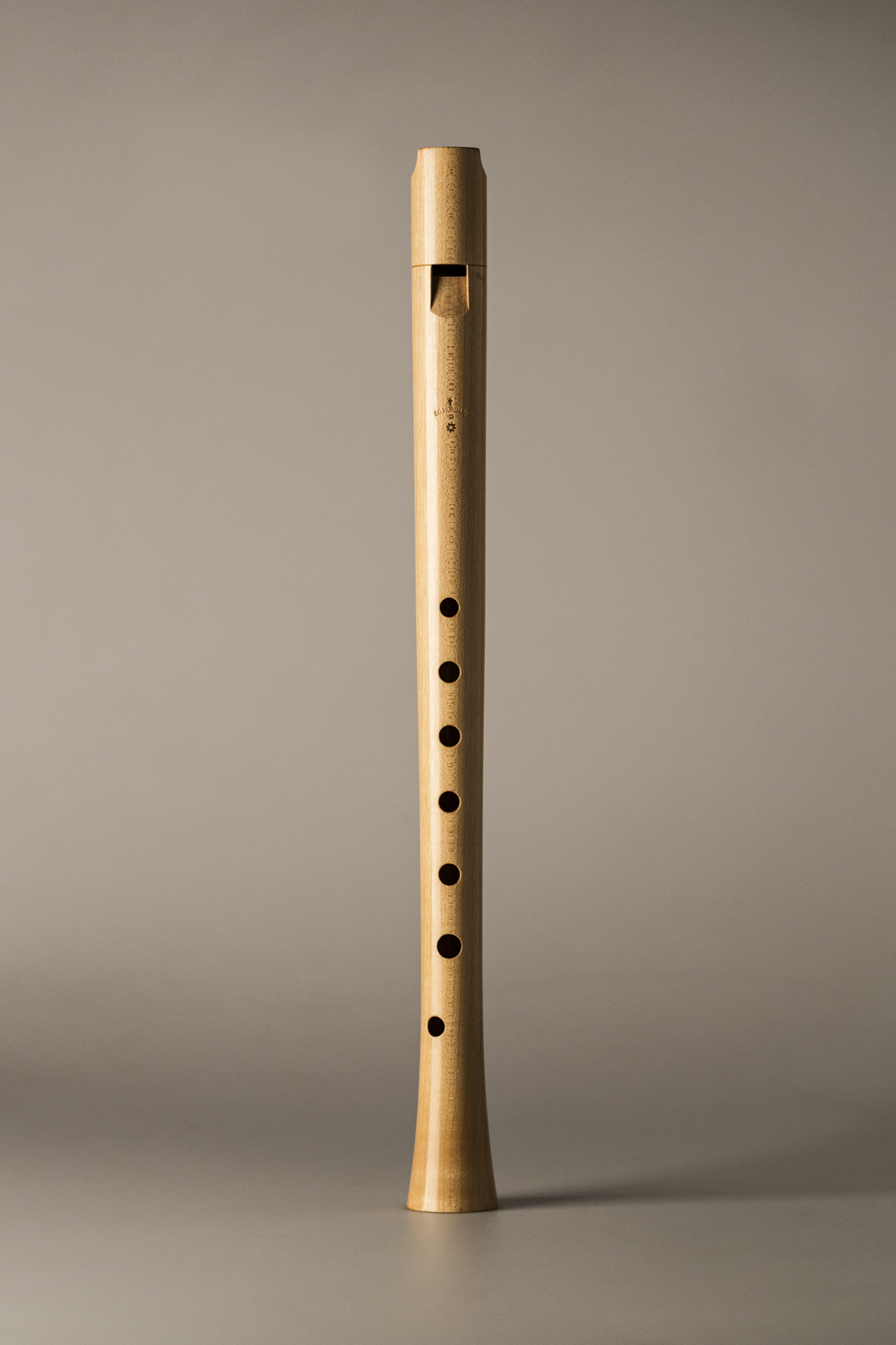 Ganassi-type-alto-recorder-by-Fred-Morgan-photo-by-Oscar-Romero (oscaromi).